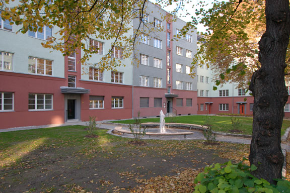 Vorgärten nach Modernisierung